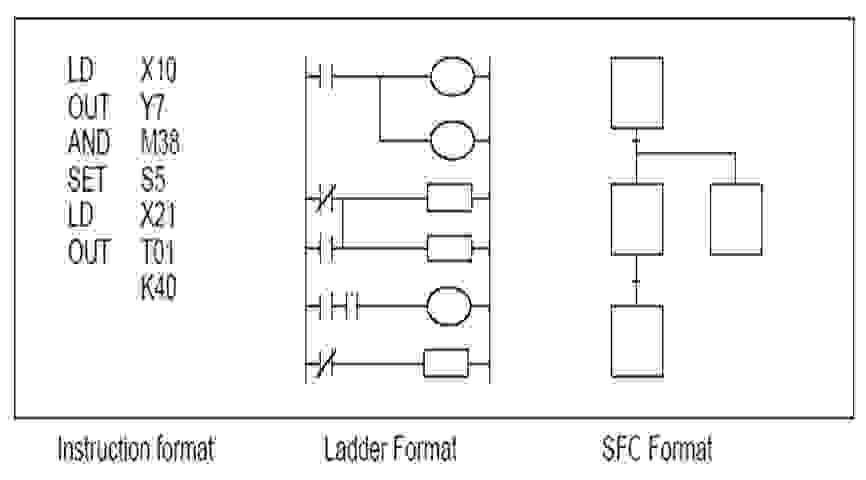 PLC design picture